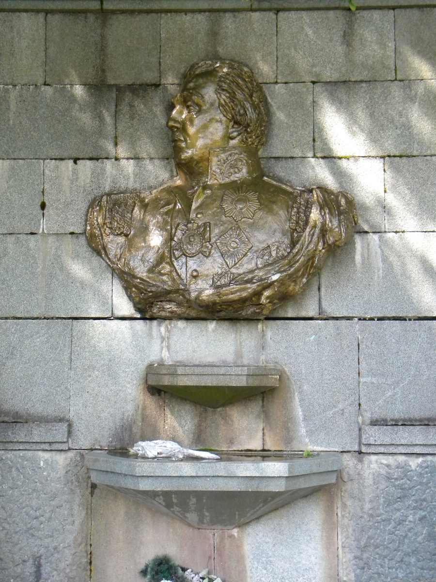 Місце поранення М. І. Кутузова («Кутузовський фонтан»), Алуштинська міськрада, 35-й км шосе Сімферополь — Алушта